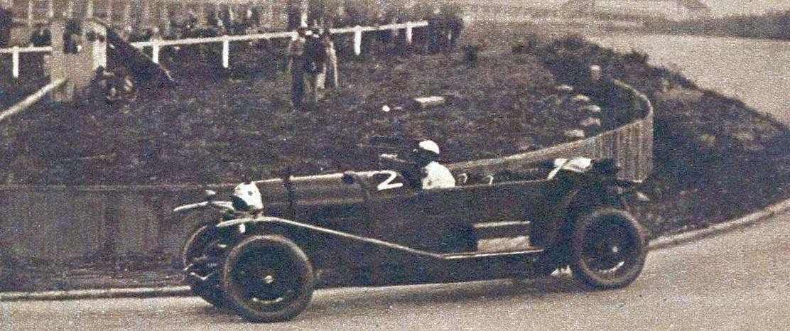 24 heures de Monthléry 1927, la Bentley 3L. victorieuse de George Duller et Frank Clement.